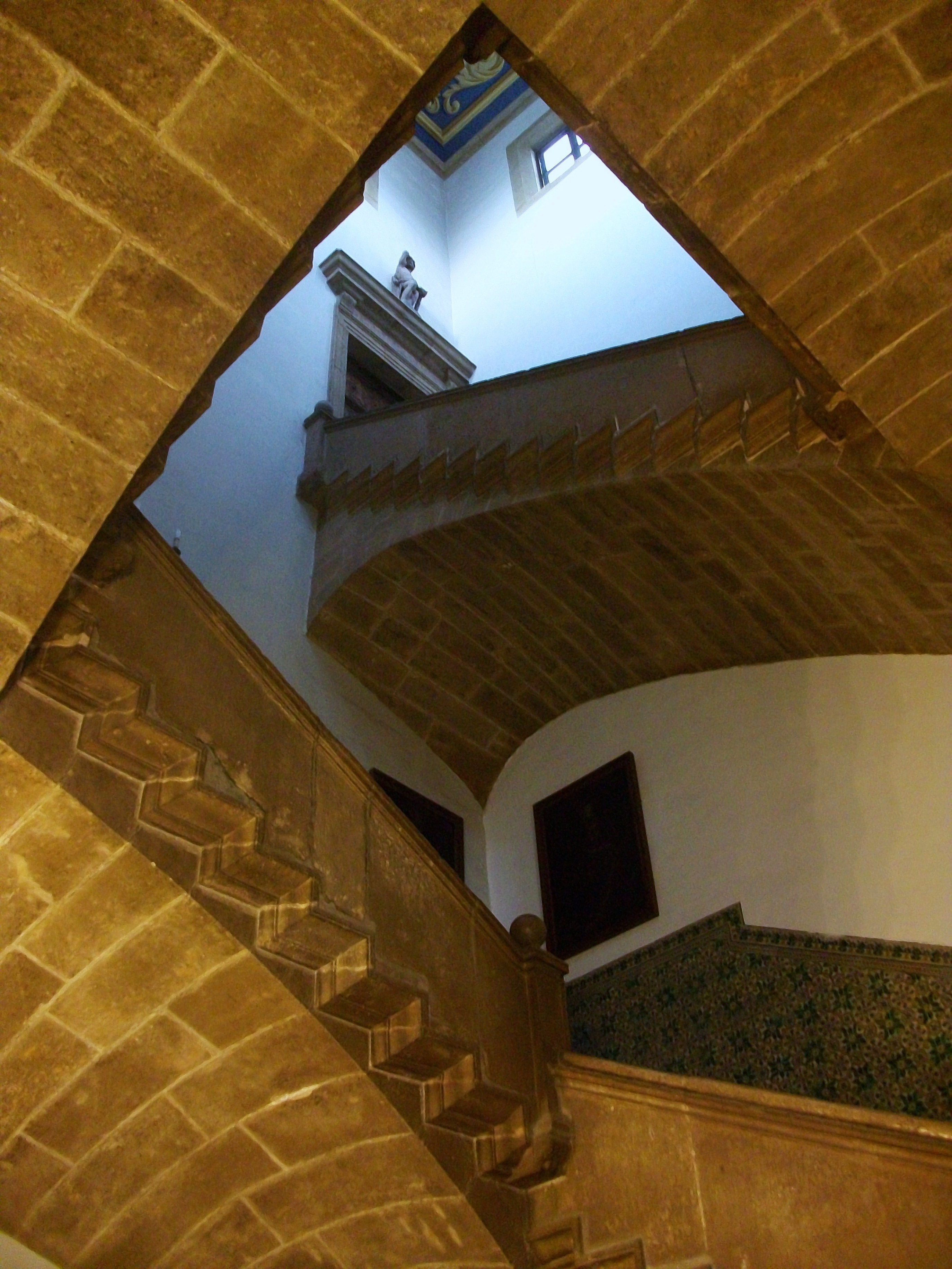 Escala de voltes del Col·legi del Corpus Christi de València.